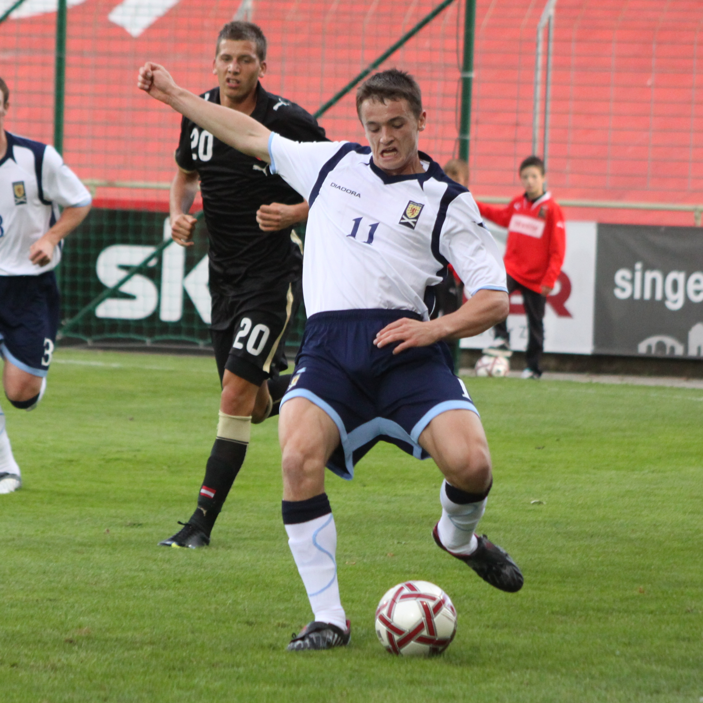 Stephen McGinn (FC St. Mirren) - Schottische Fußballnationalmannschaft (U-21-Männer) Stephen McGinn (St. Mirren F.C.) - Scotland national under-21 football team — (2)